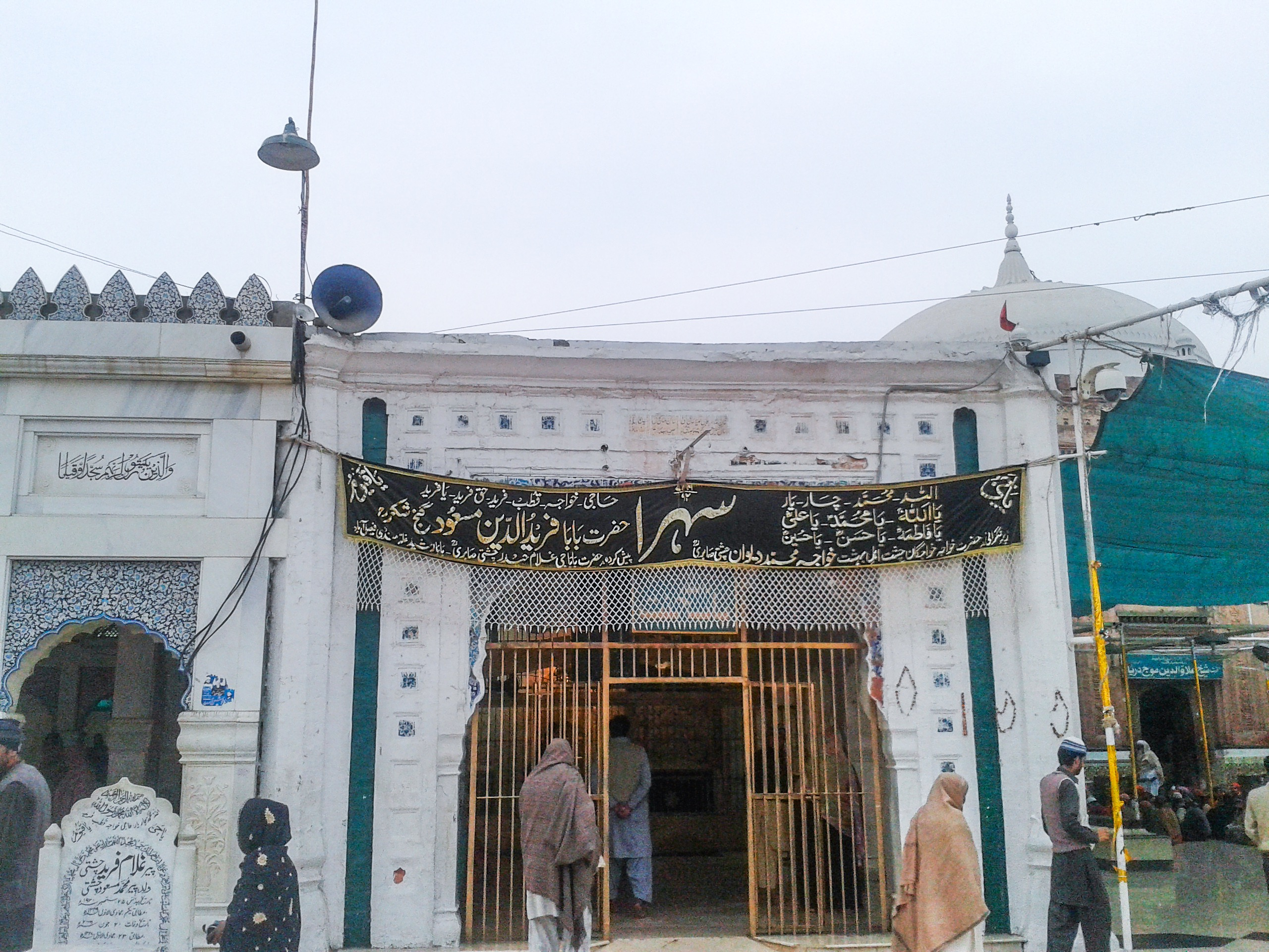 Darbar Hazrat Baba Farid ud Deen Ganj Shakar Rahmatullah Alaih